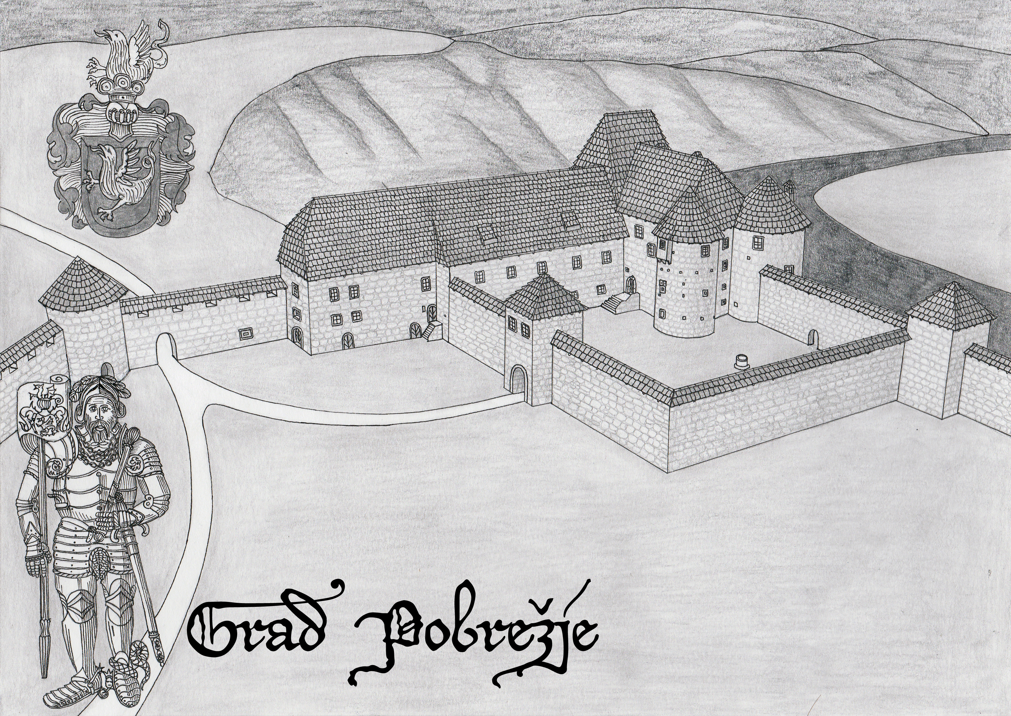 Poskus rekonstrukcije gradu Pobrežje v 18.stol. Grb in nagrobna plošča ustanovitelja gradu, krajišnjiškega poveljnika, namestnika poveljnika v Bihaču, žumberškega glavarja, stotnika senjskih Uskokov in generala Vojne krajine, barona Ivana Lenkoviča.